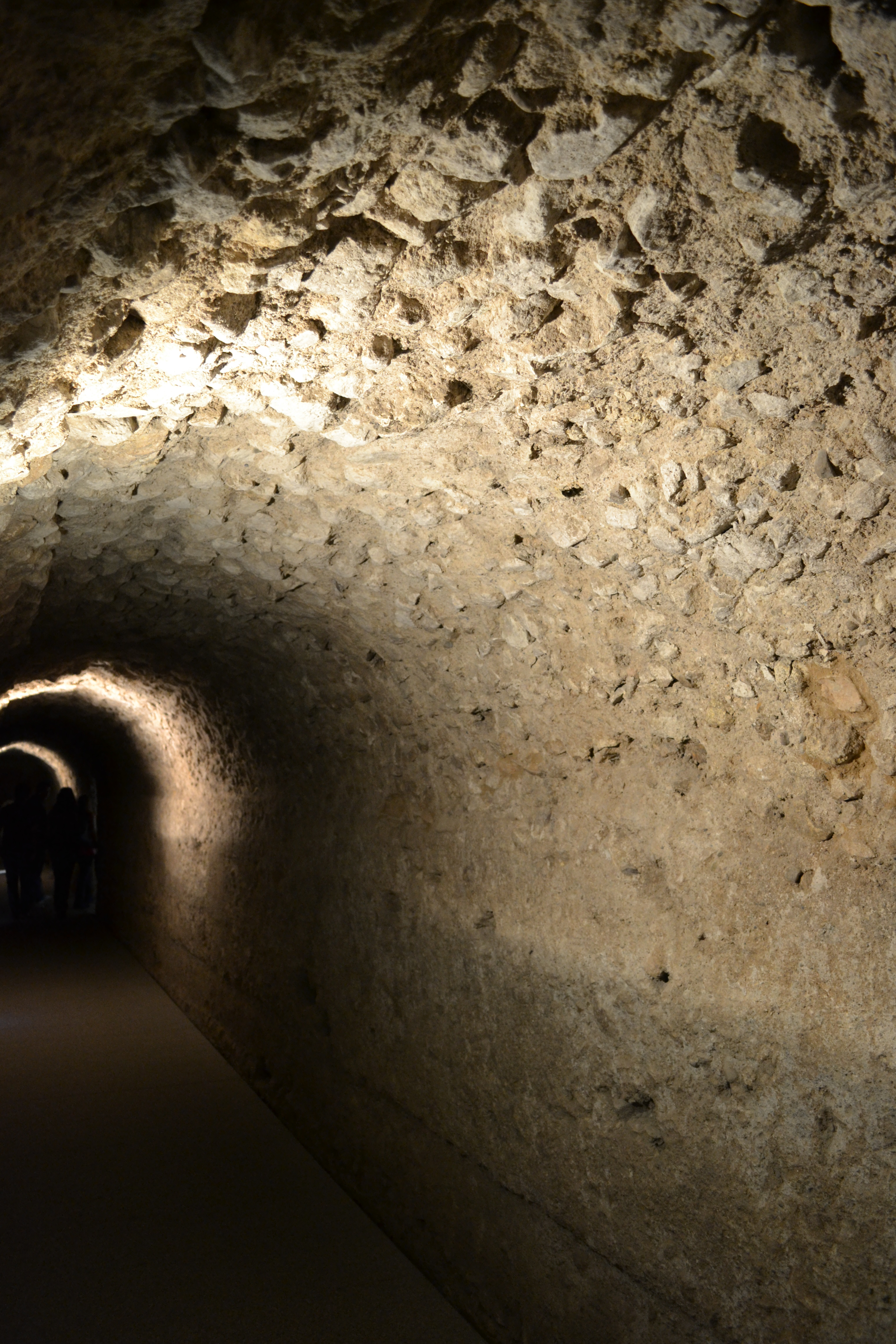 Interior de la cloaca del foro. Material empleado opus caementicium. Época del emperador Tiberio.